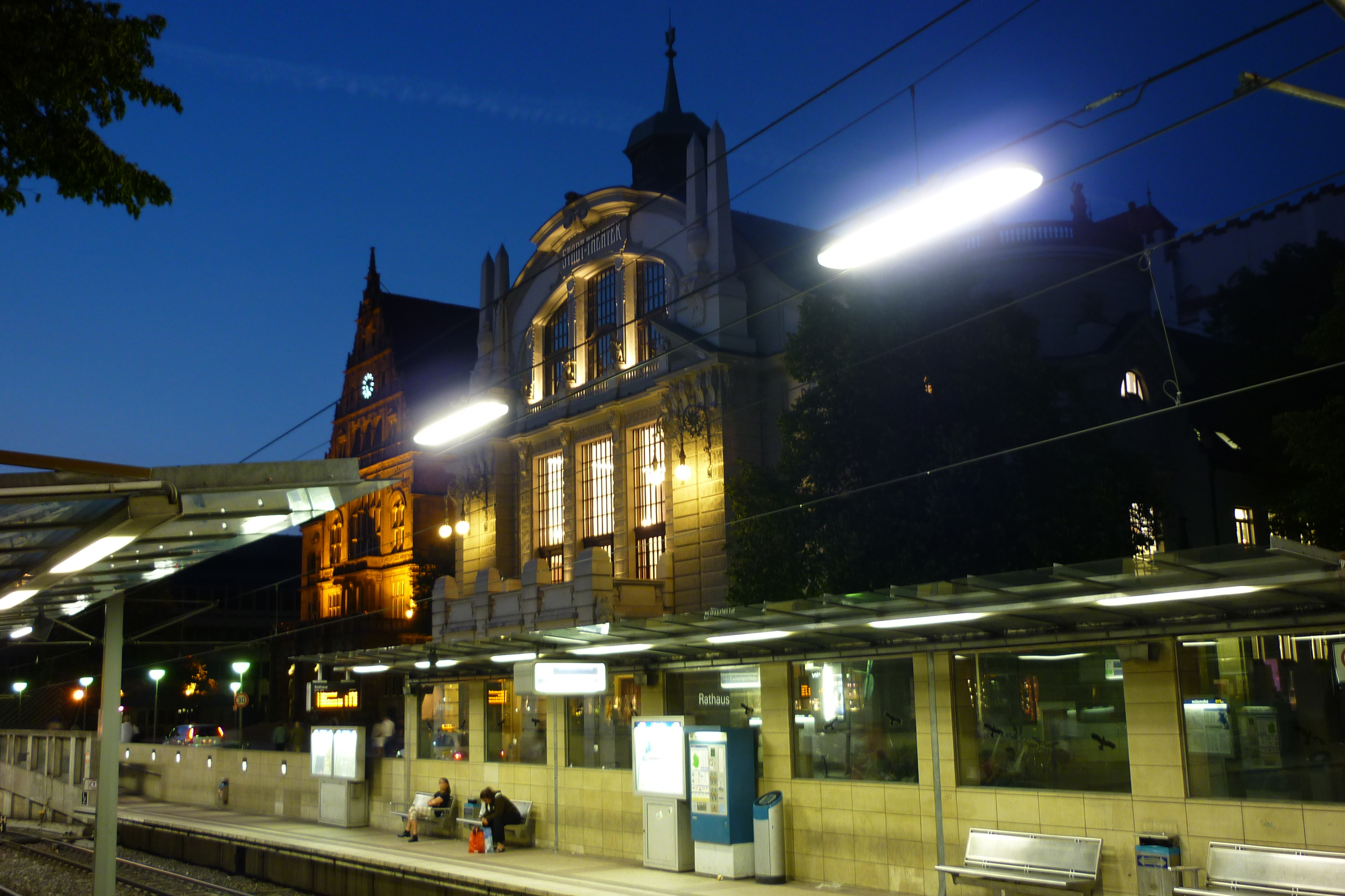 Bielefeld, Stadtbahnhaltestelle "Rathaus" mit altem Rathaus und Stadttheater (Jugendstil).